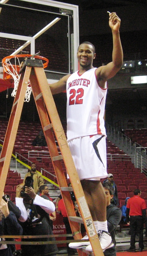 Erik Copes